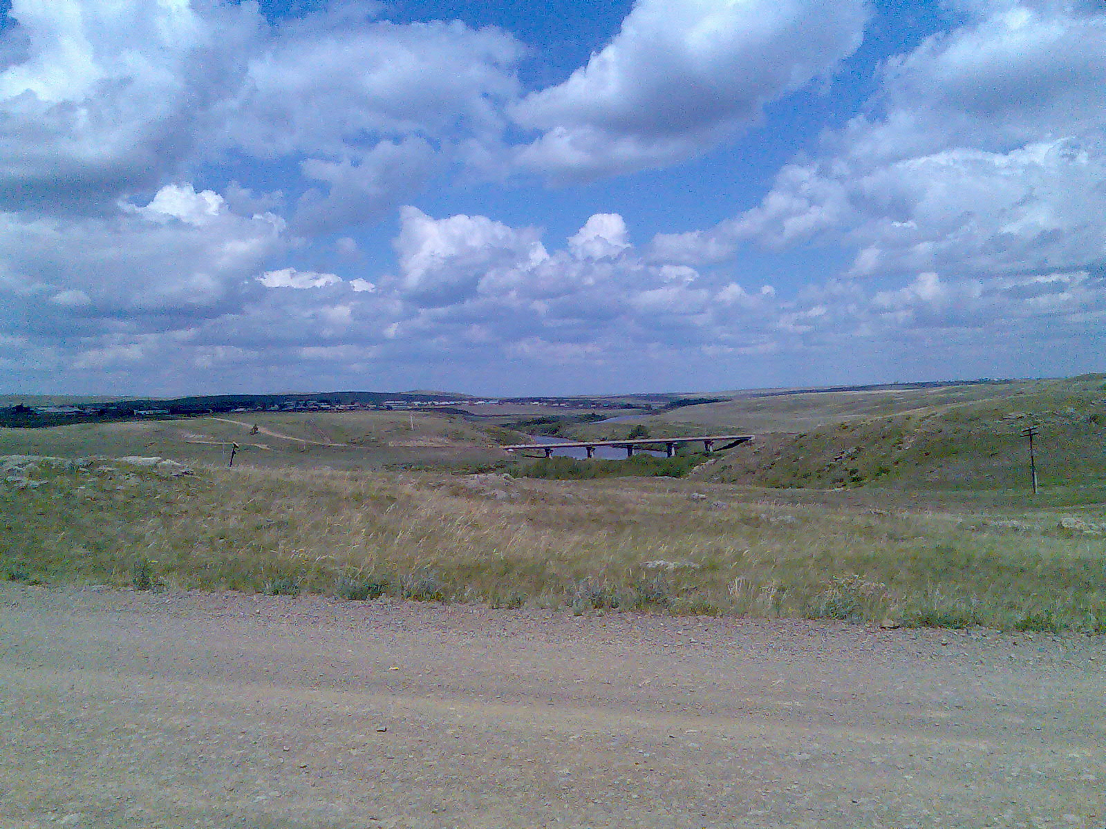 Новый мост